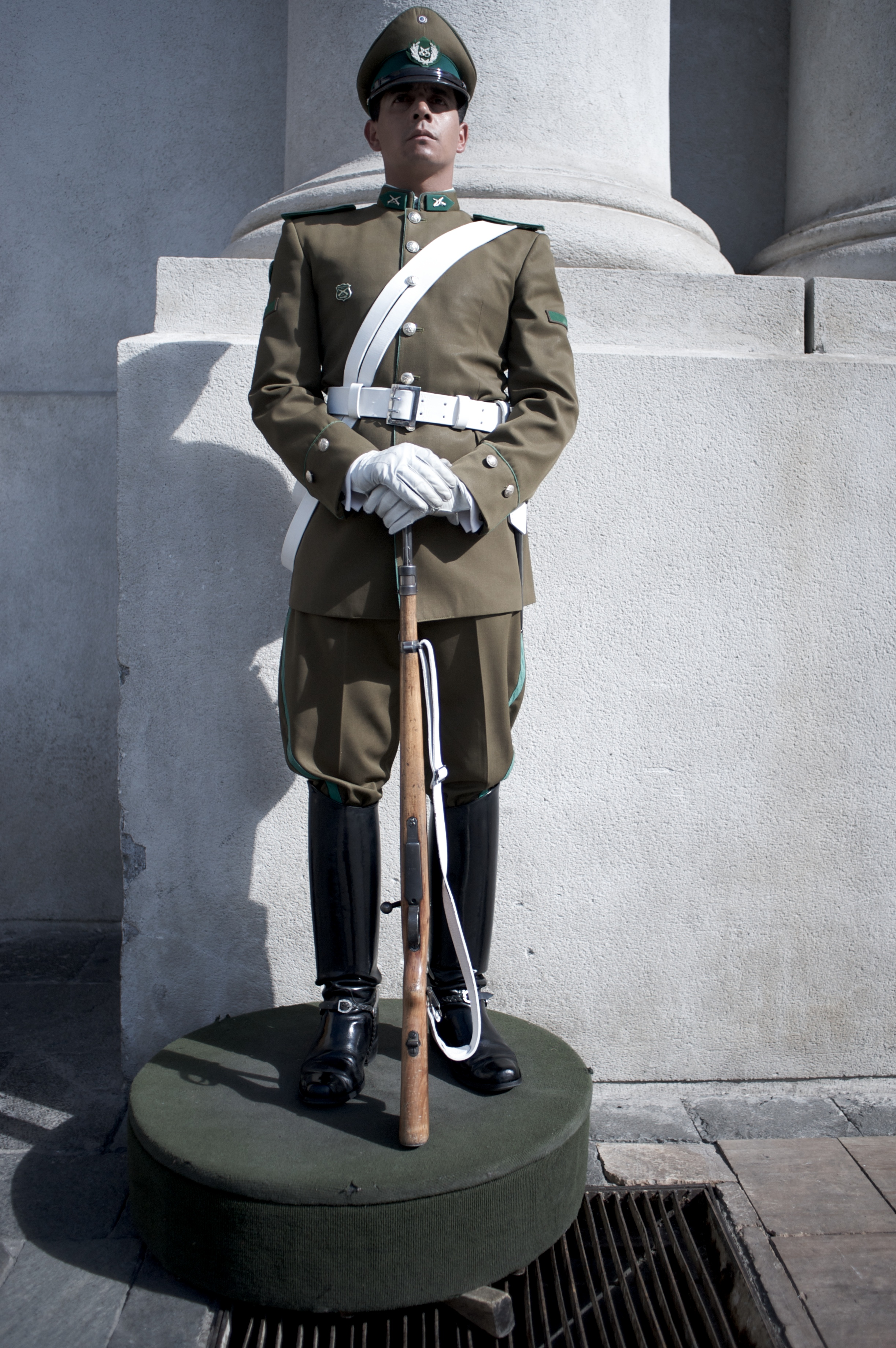 Carabinero Guardia del Palacio de La Moneda, Santiago Chile.